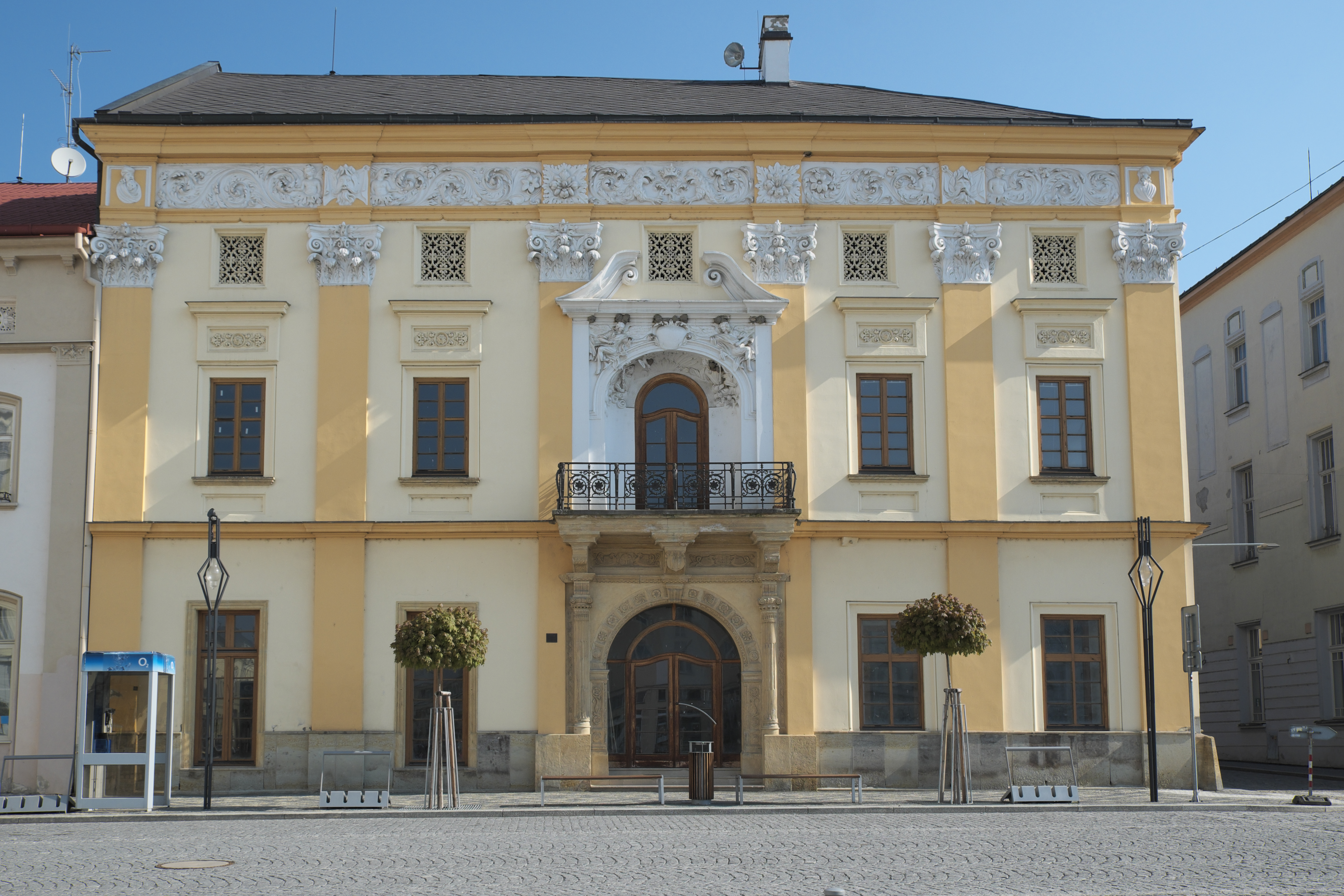 Litovel Bürgerhaus, Náměstí Přemysla Otakara 769/2, in Litovel im Okres Olomouc in der Olmützer Region in Tschechien